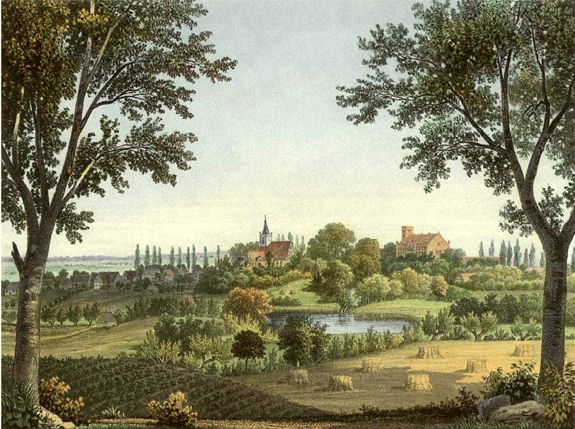 Gut Polssen